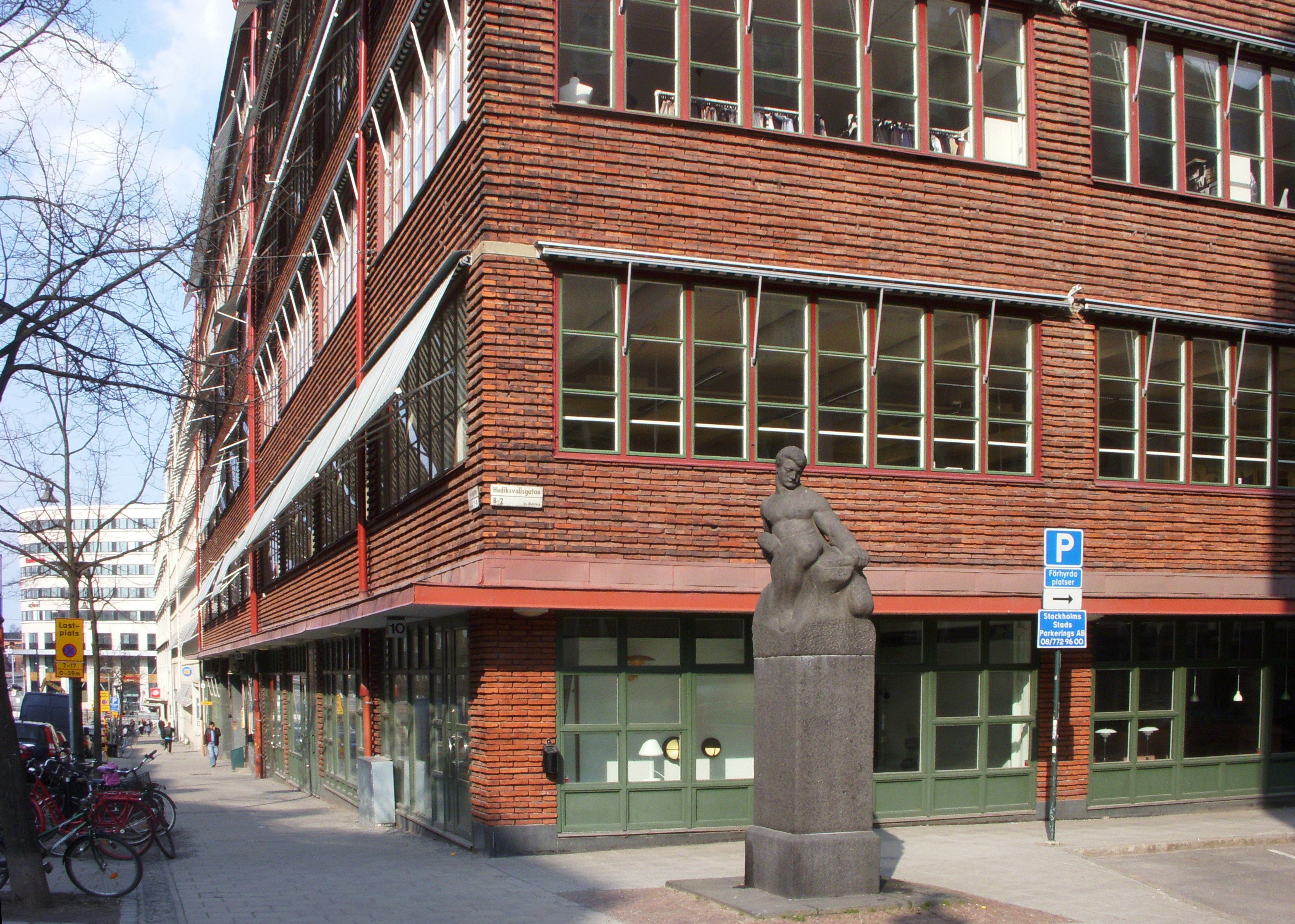 Industricentralen hörnet Gävlegatan/Hudiksvallsgatan, arkitekt Ragnar Östberg